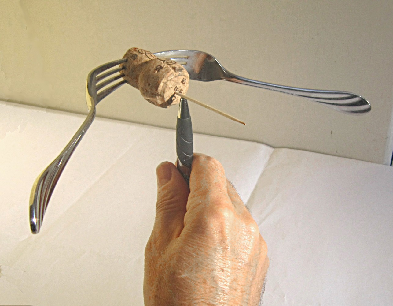 Ekvilibro kaj masocentro